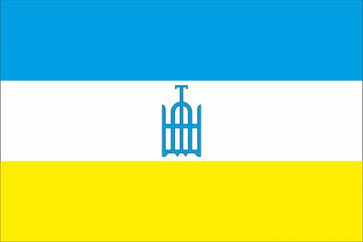 Прапор села Ташань